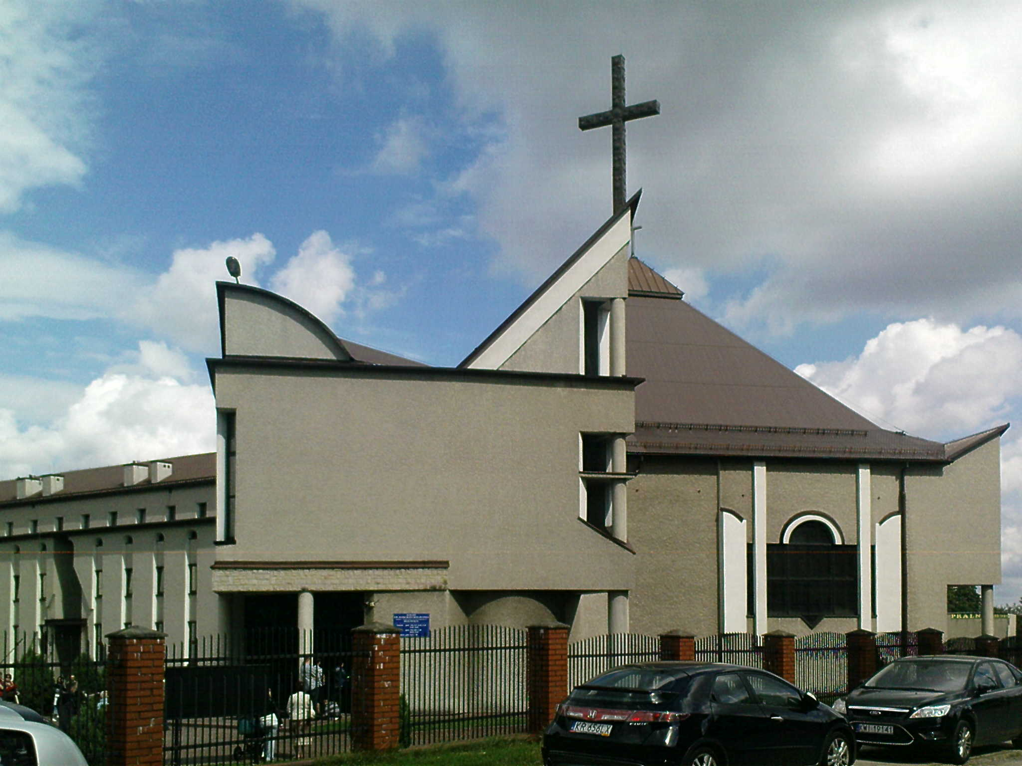 Kościół parafialny p.w. Matki Bożej Różańcowej w Krakowie (Piaski Nowe)